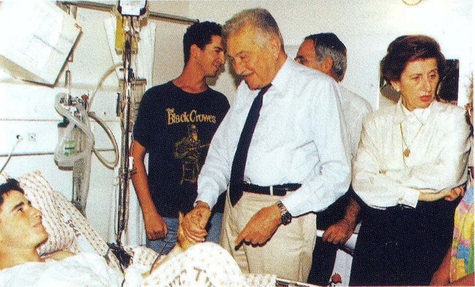 הנשיא ויצמן באחד מביקורי הפצועים הרבים